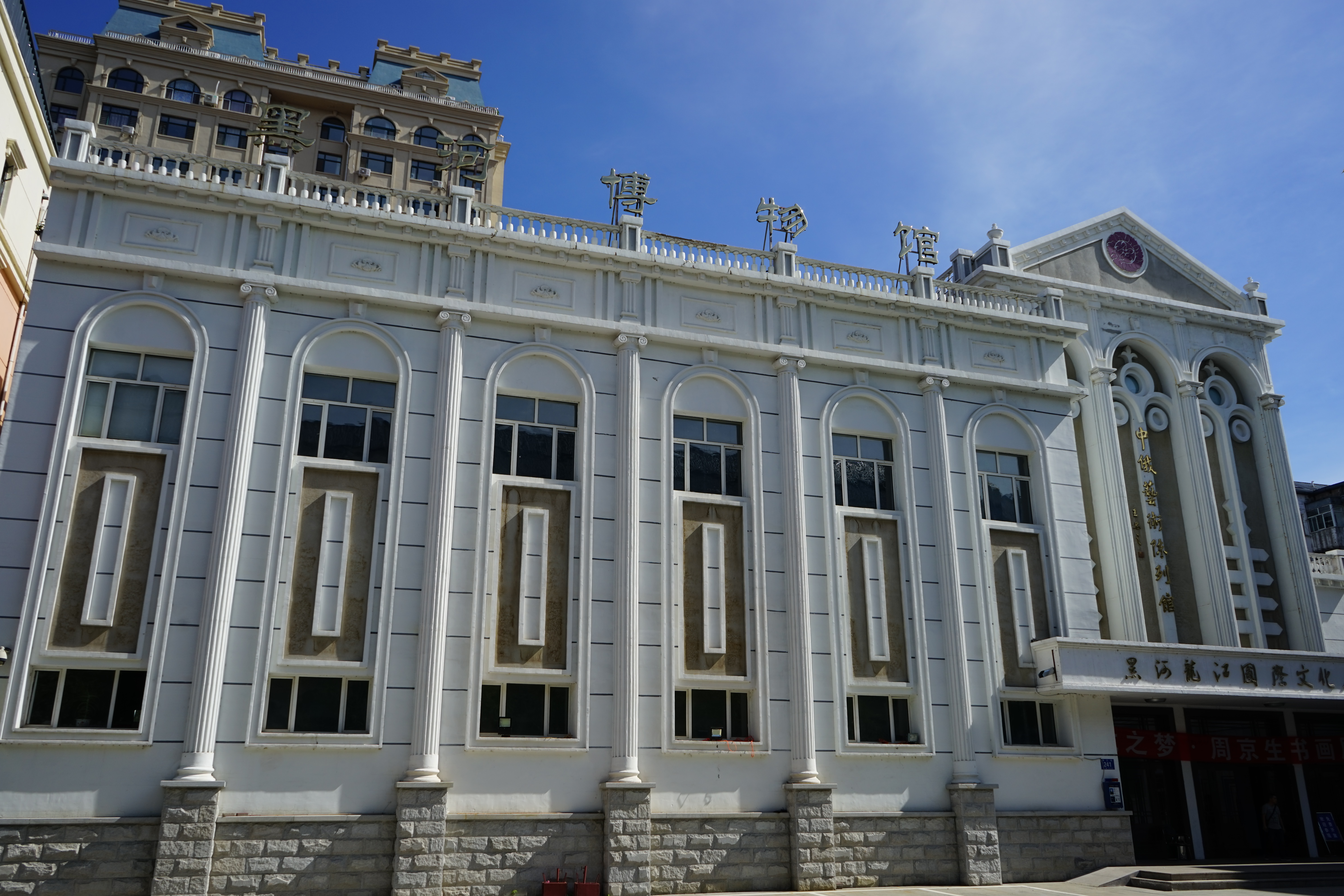 黑河博物馆